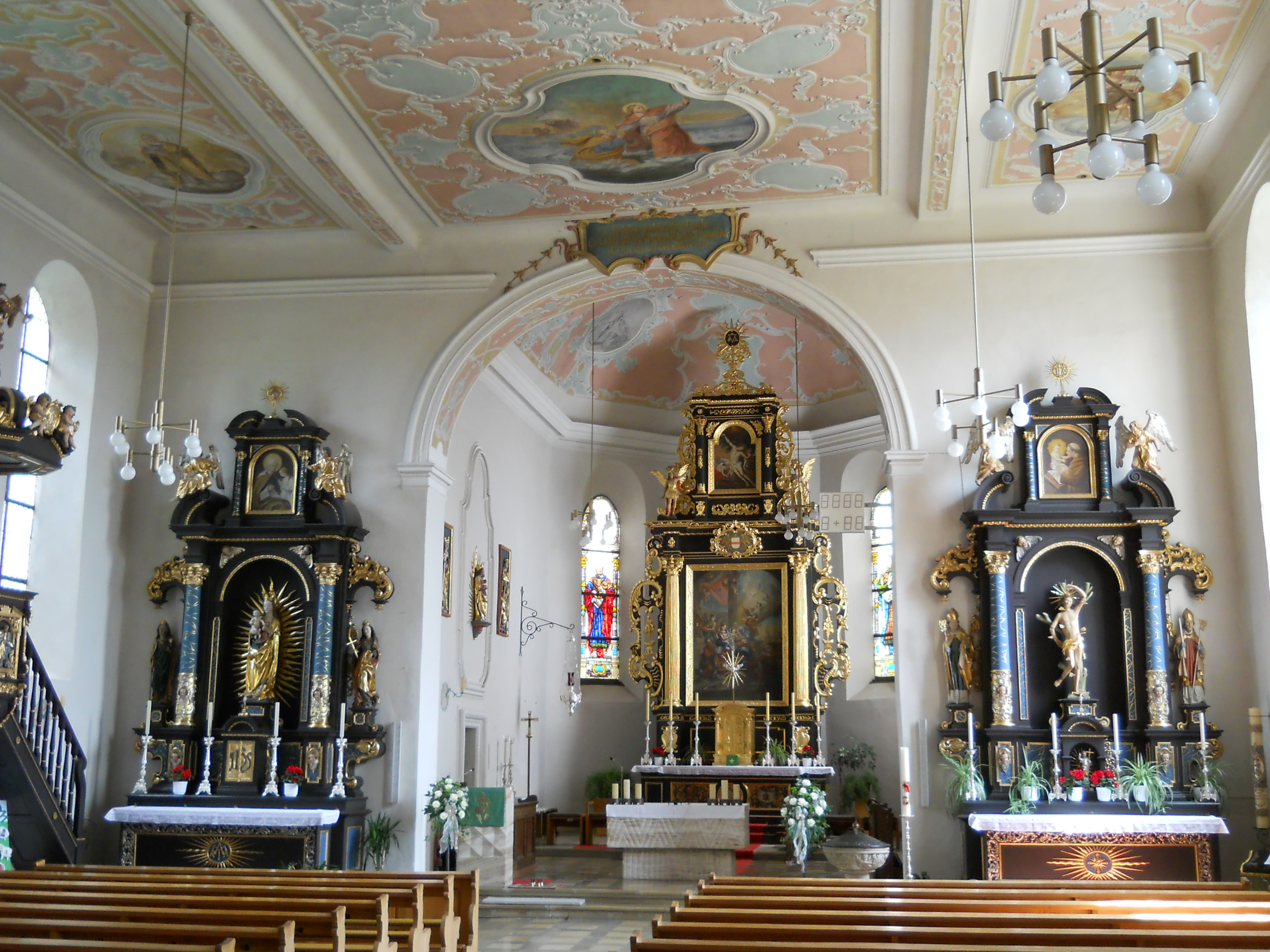 Aurach (Landkreis Ansbach), Kath. Pfarrkirche St. Peter und Paul, Inneres